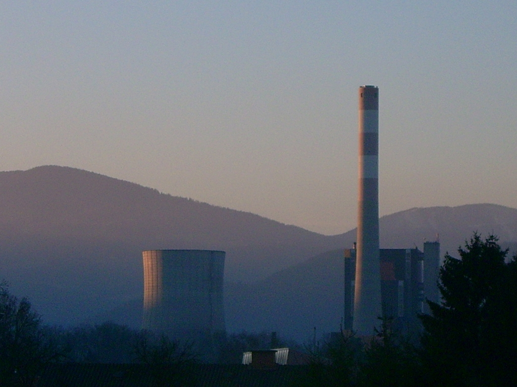 ÖDK-Voitsberg